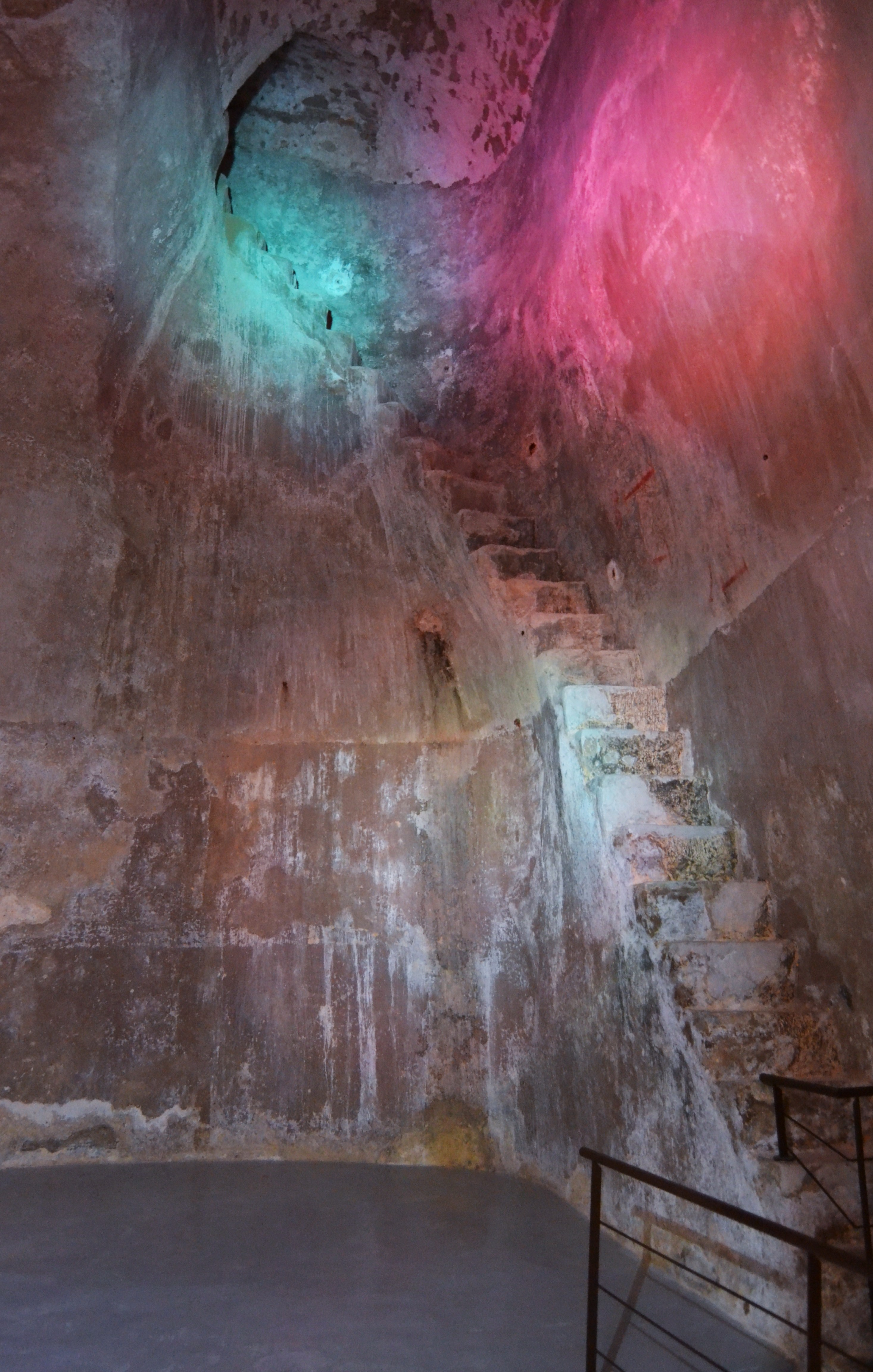 Pous de Garrigós, escala del dipòsit gran, Alacant.